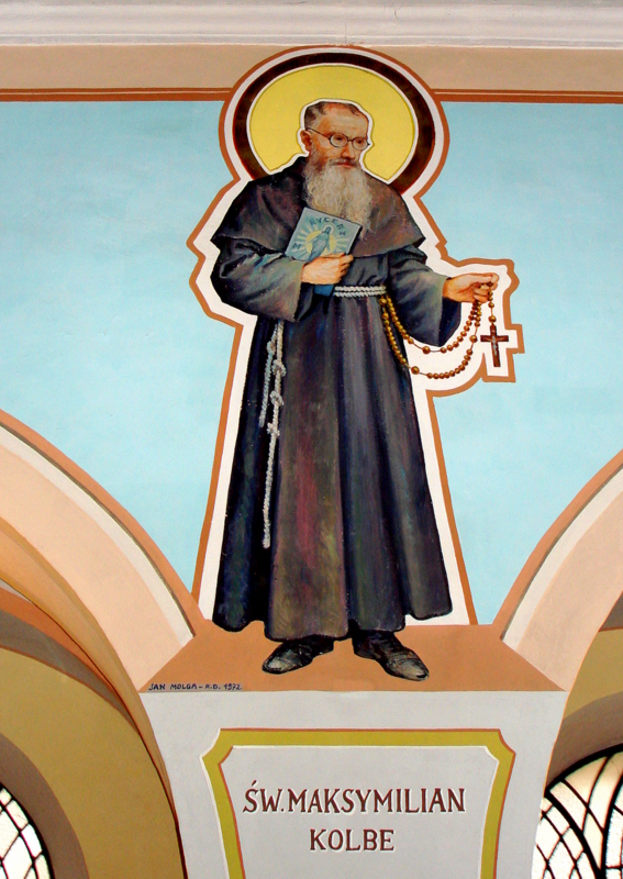 Kamienna Góra, kościół par. p.w. śś. Piotra i Pawła, XVI